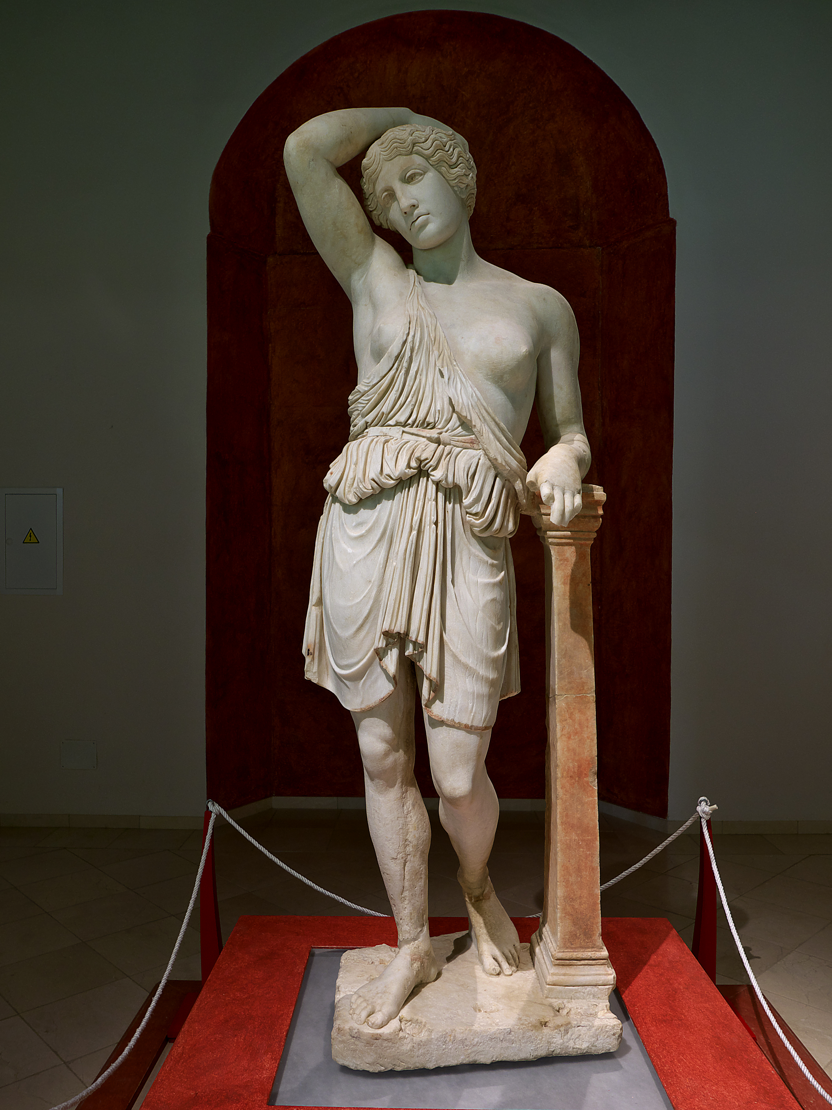 Museo Histórico Municipal de Écija (España). Copia romana, primer tercio del siglo II d.C., de escultura de bronce colocada en el Templo de Artemisa (Éfeso), atribuida principalmente a Policleto, sin descartar a Fidias o Crésilas (s. V a.C.). Tallada en una sola pieza de mármol pentélico, muy completa y con restos de policromía. Clasificada en el tipo sciarra del que existen tres copias, Ny Carlsberg Glyptotek (Copenhague), Metropolitan Museum (Nueva York) y Antiken-sammlung, Berlín.